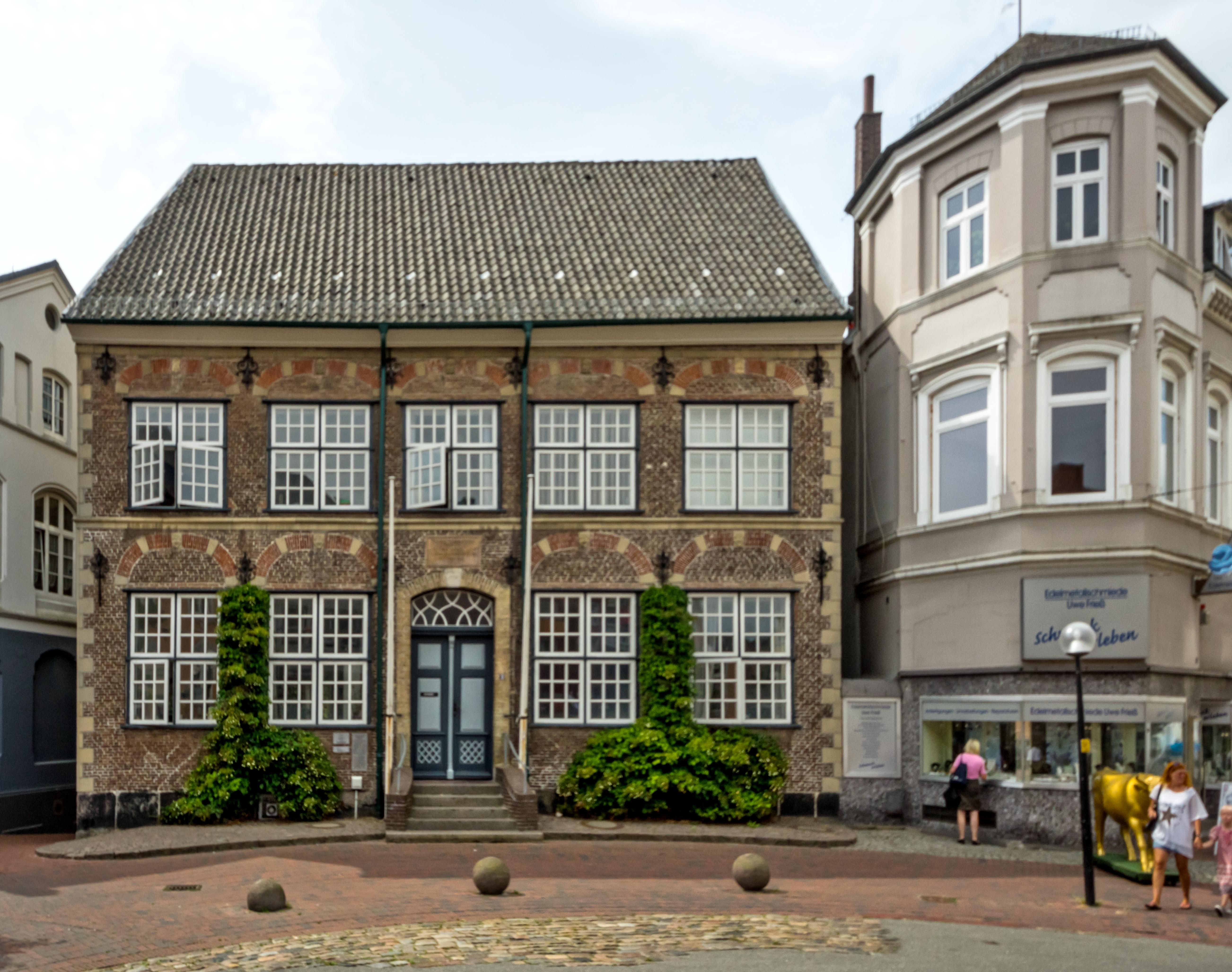 Bilder aus Schleswig Gebäude in Schleswig